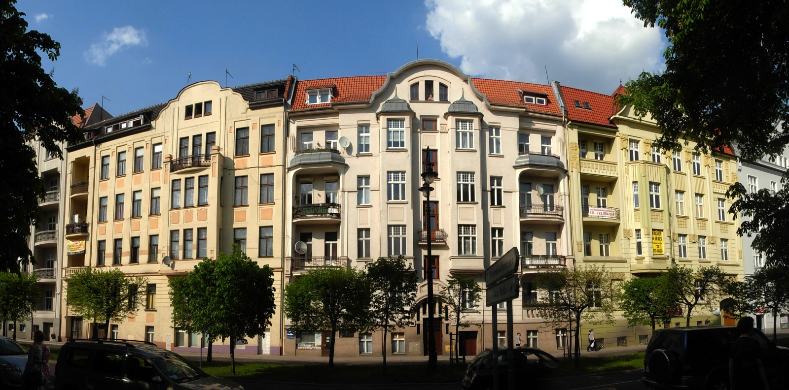 Północna pierzeja alei Adama Mickiewicza w Bydgoszczy